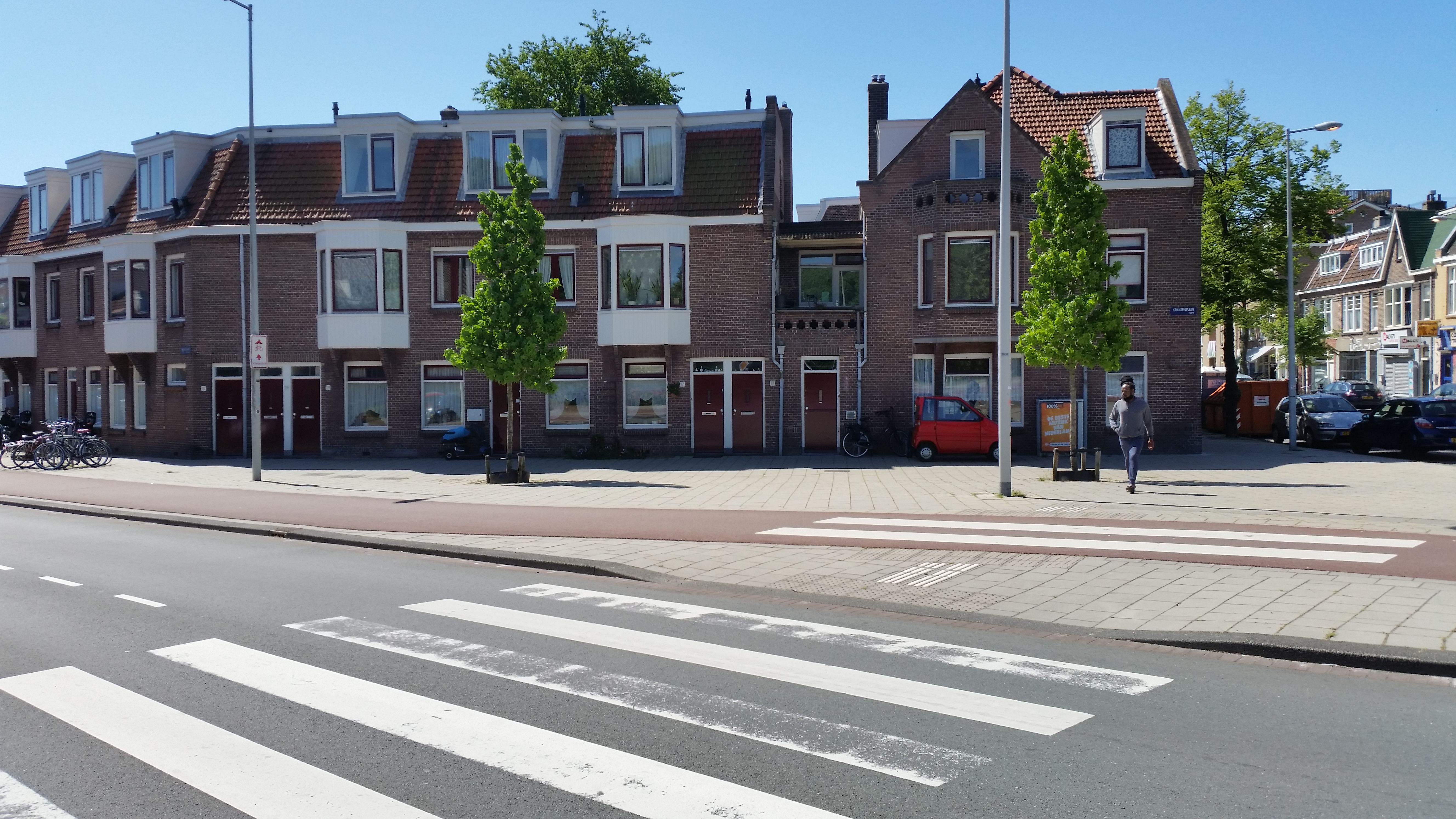 Impressie van het Kraaienplein, Amsterdam-Noord (mei 2020)